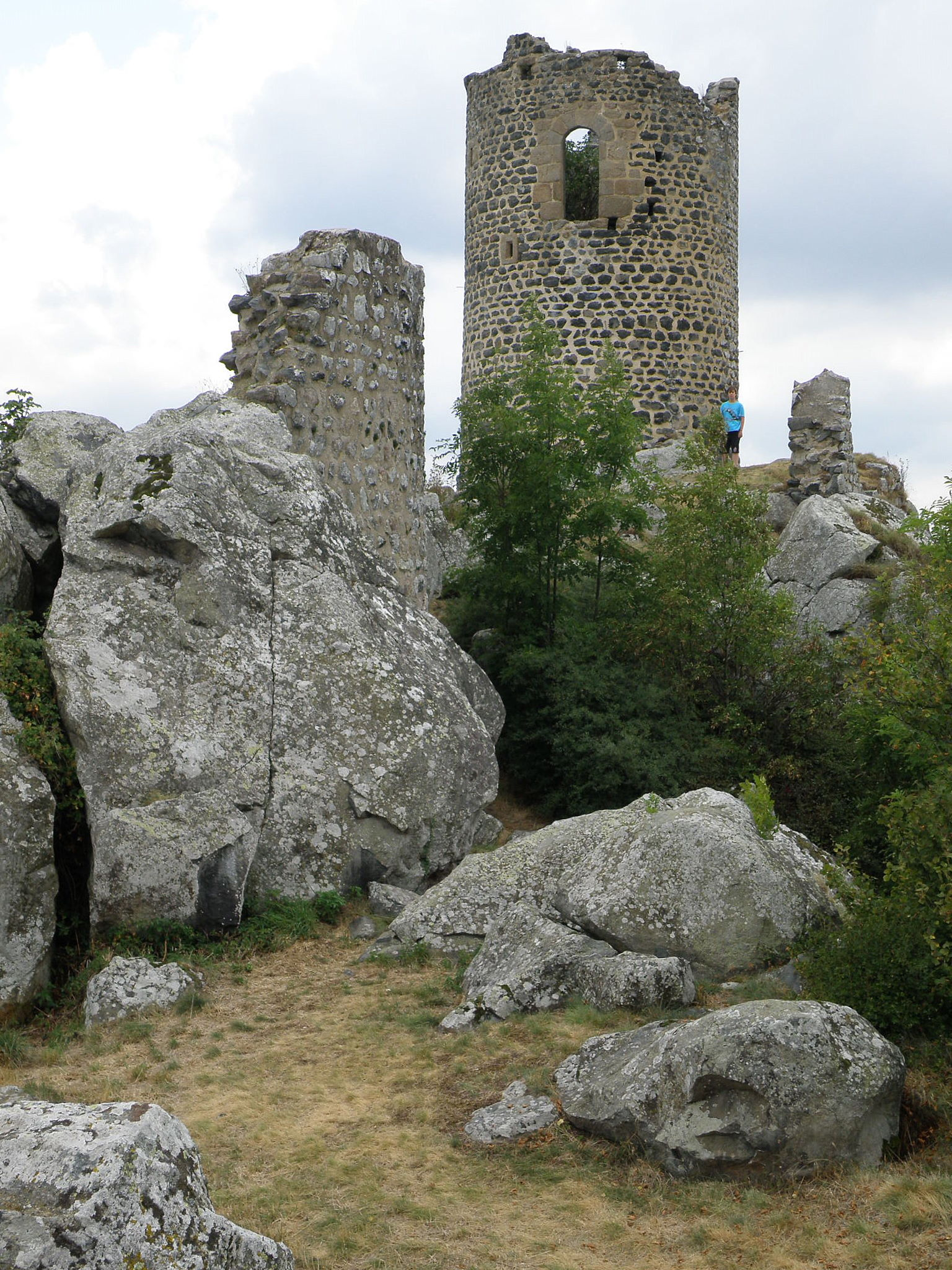 Roche-en-Régnier, comm. de la Haute-Loire, France (Auvergne). Ruines du château médiéval, avec donjon circulaire.